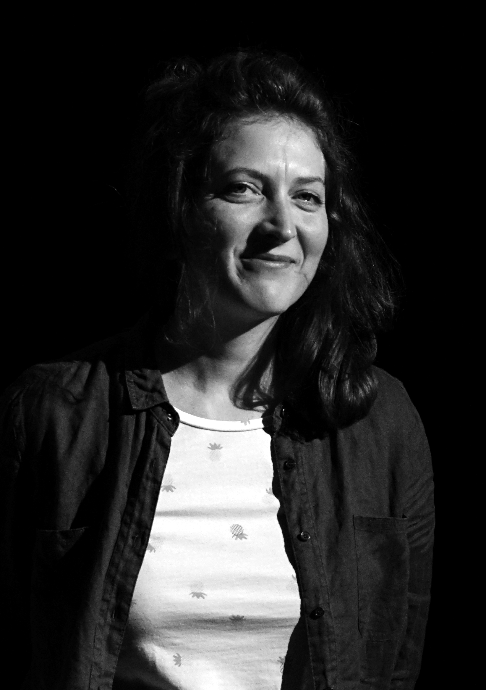 lors du Sunnyside, festival à Reims.